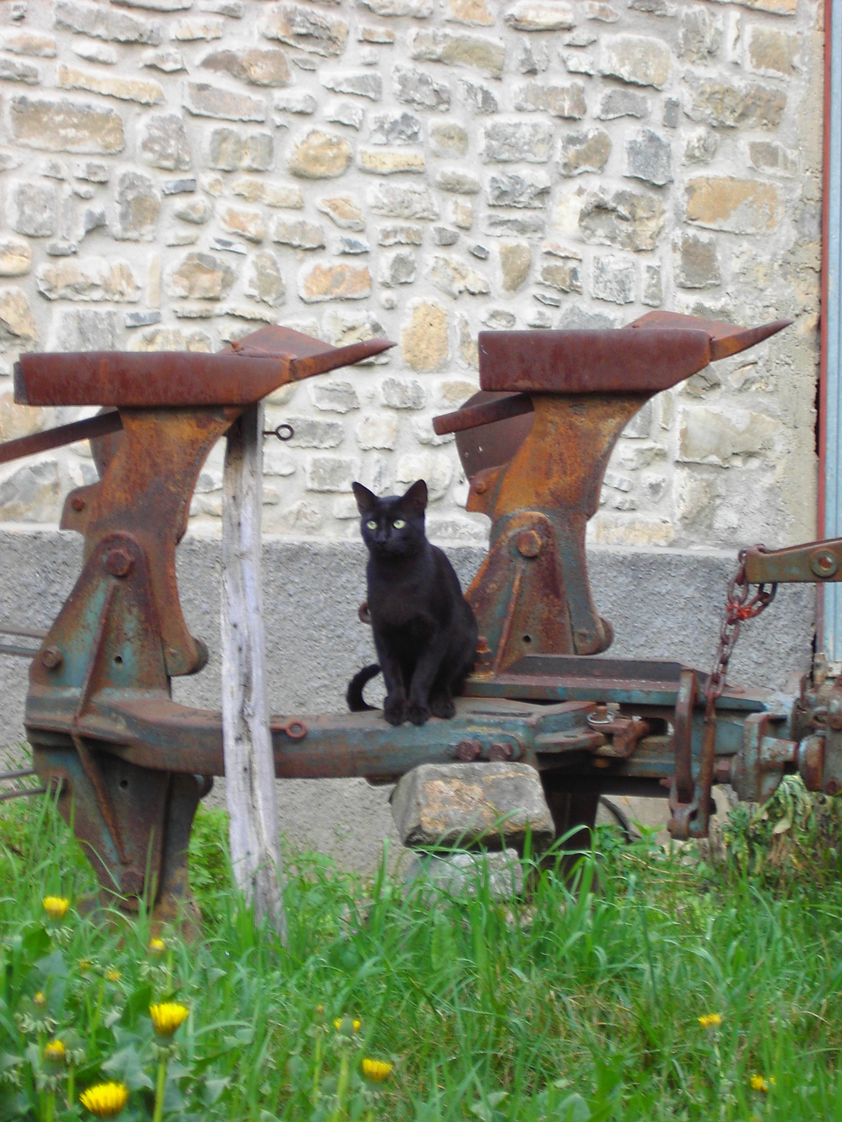 Arado moderno para tractor agrícola.